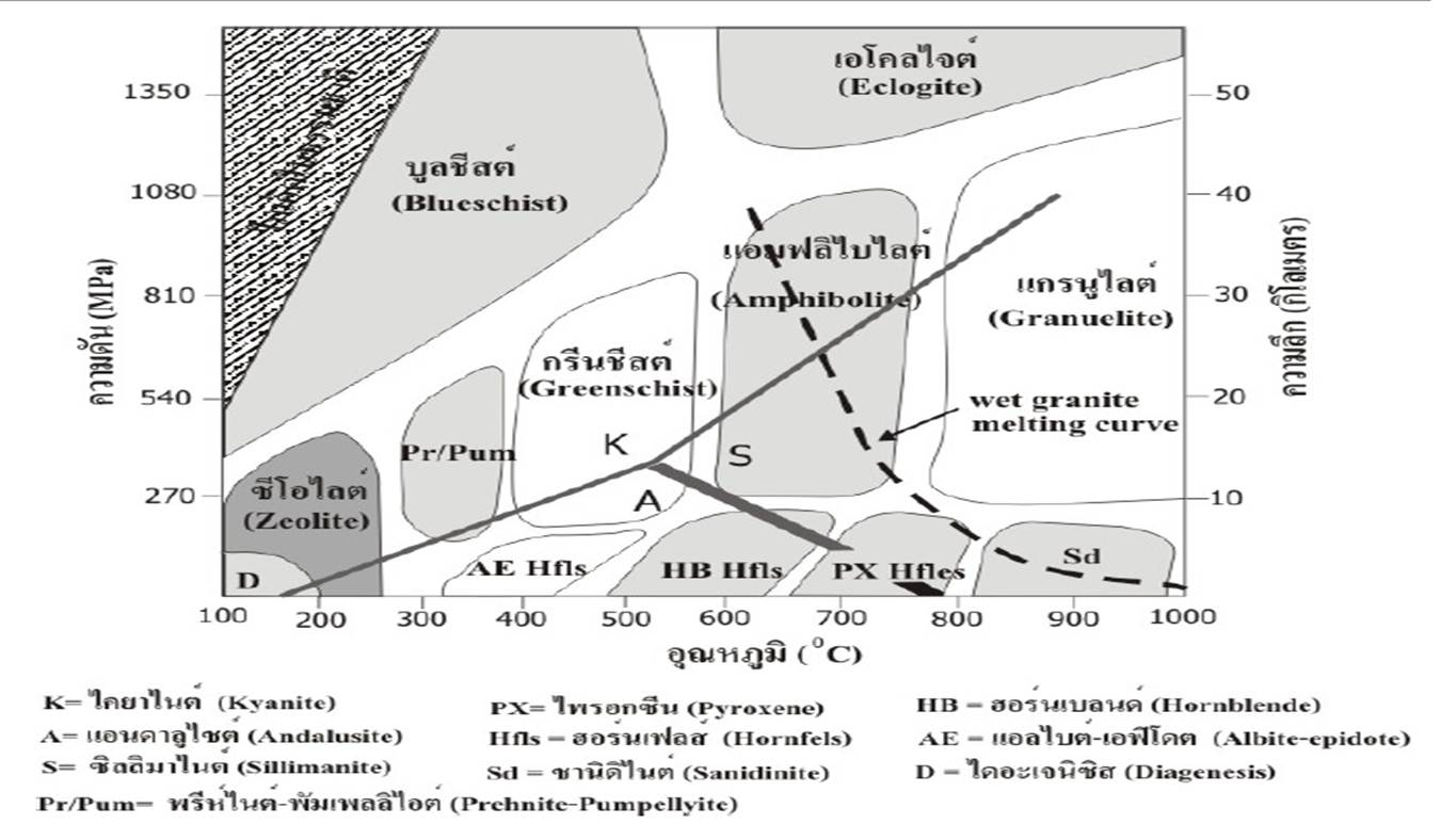 ภาพแสดงชุดลักษณ์การแปรสภาพ ตามอุณหภูมิและความดัน